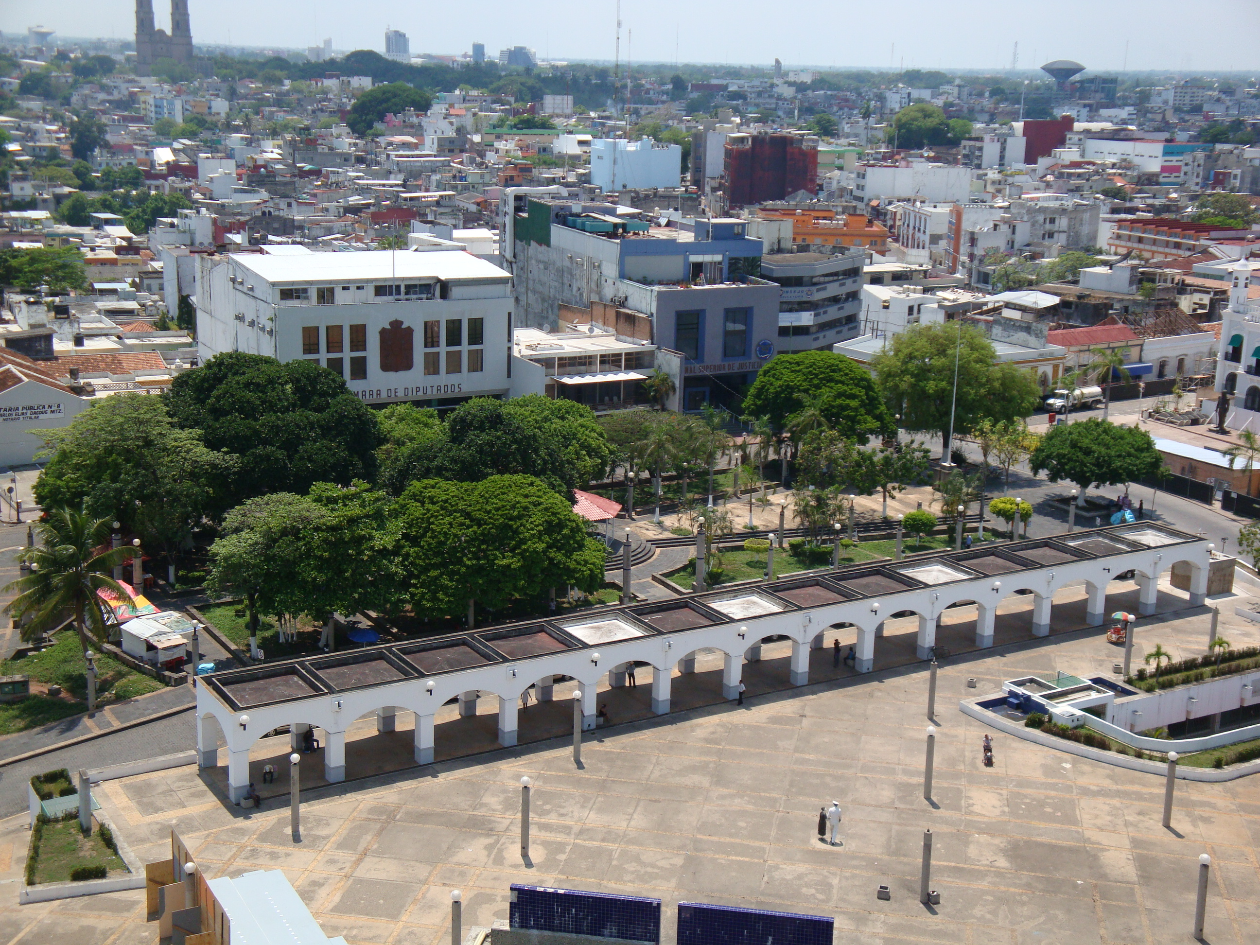 Plaza de Armas de la ciudad de Villahermosa, Tabasco, México.